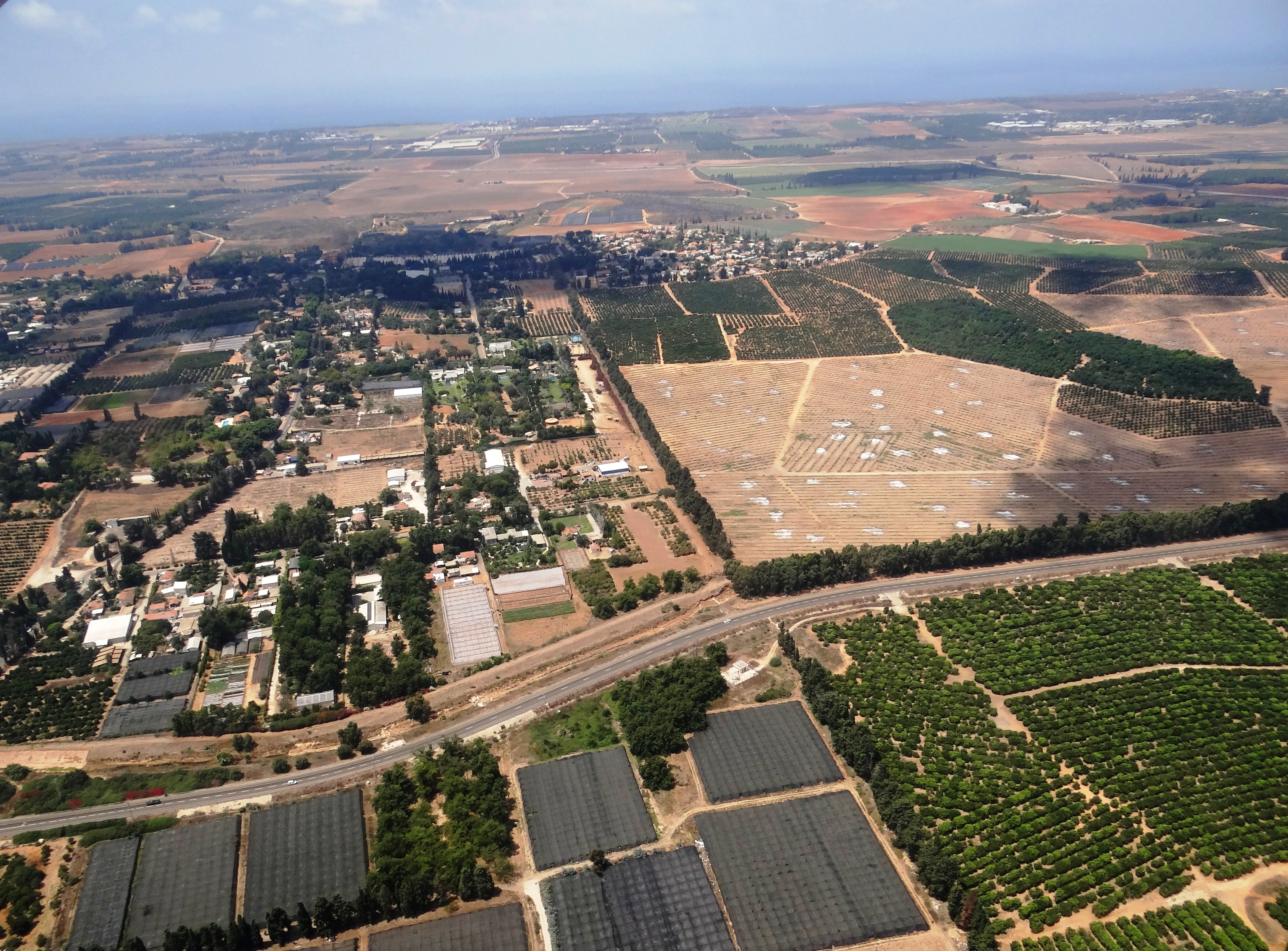 היישוב חרוצים מימין ולידו משמאלו היישוב בני ציון בשרון